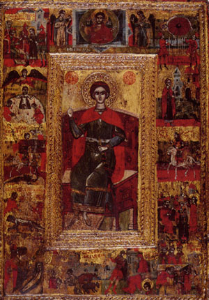 Св. Ѓорѓи со житие, 1630 год.